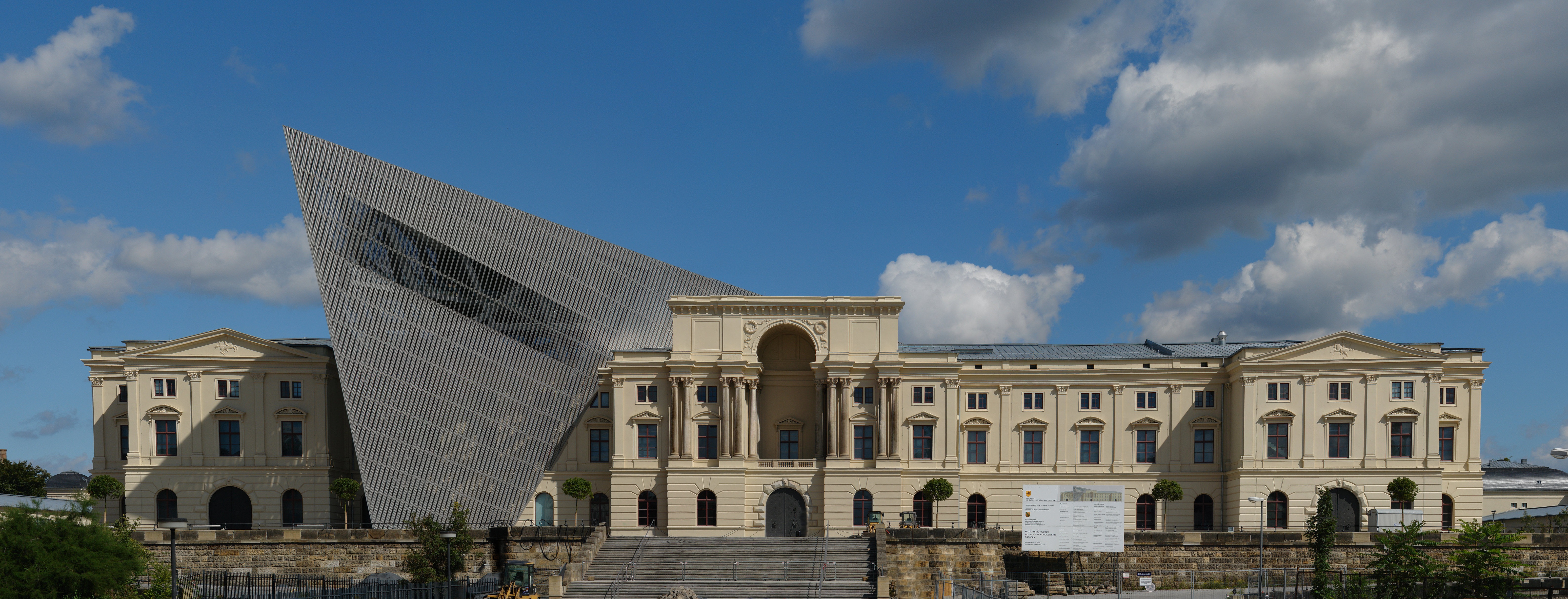 Militärhistorisches Museum der Bundeswehr kurz vor der Fertigstellung